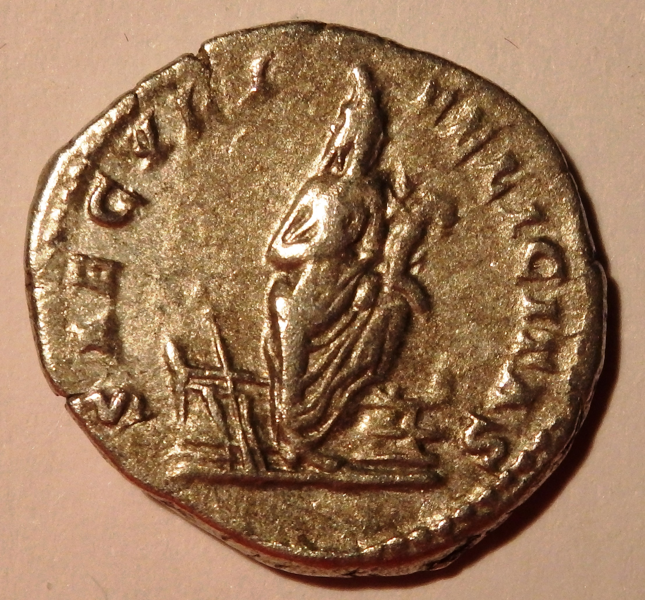 Isis, den Horusknaben stillend auf röm. Denar der Julia Domna, Kampmann 50.38